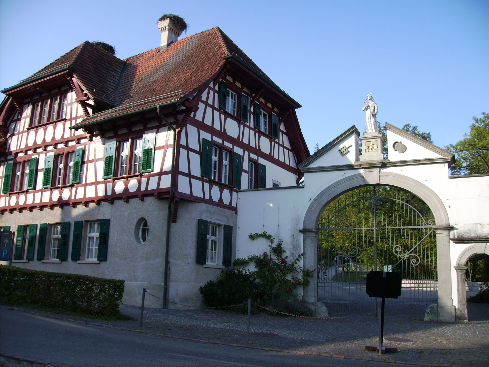 Kartause Ittingen, Kanton Thurgau, Schweiz